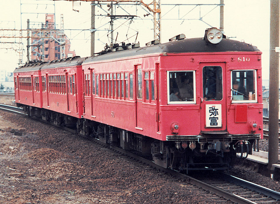 名古屋鉄道 810